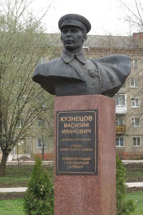 Монумент в Сергиевом Посаде